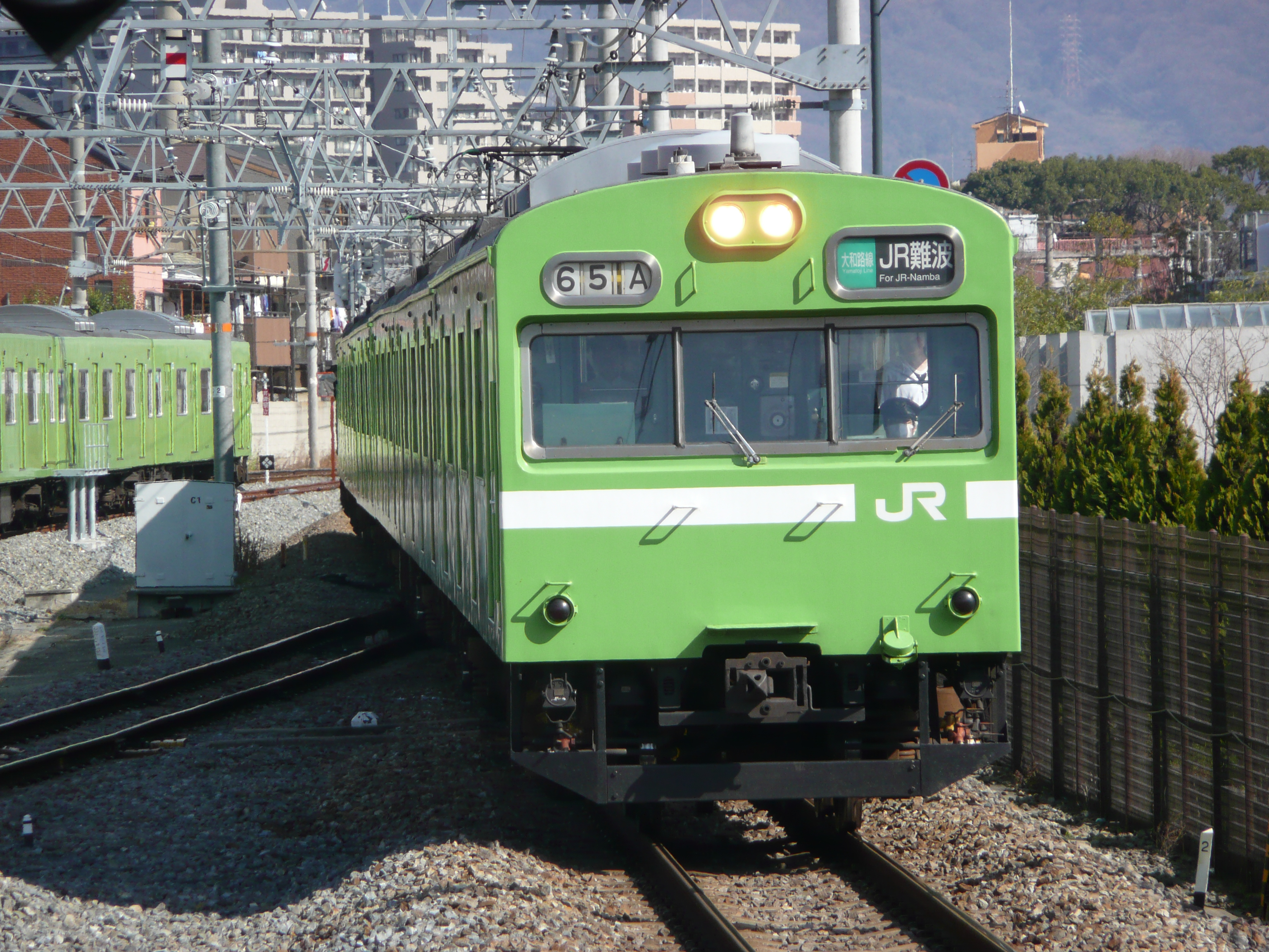 新方向幕を使用した103系。